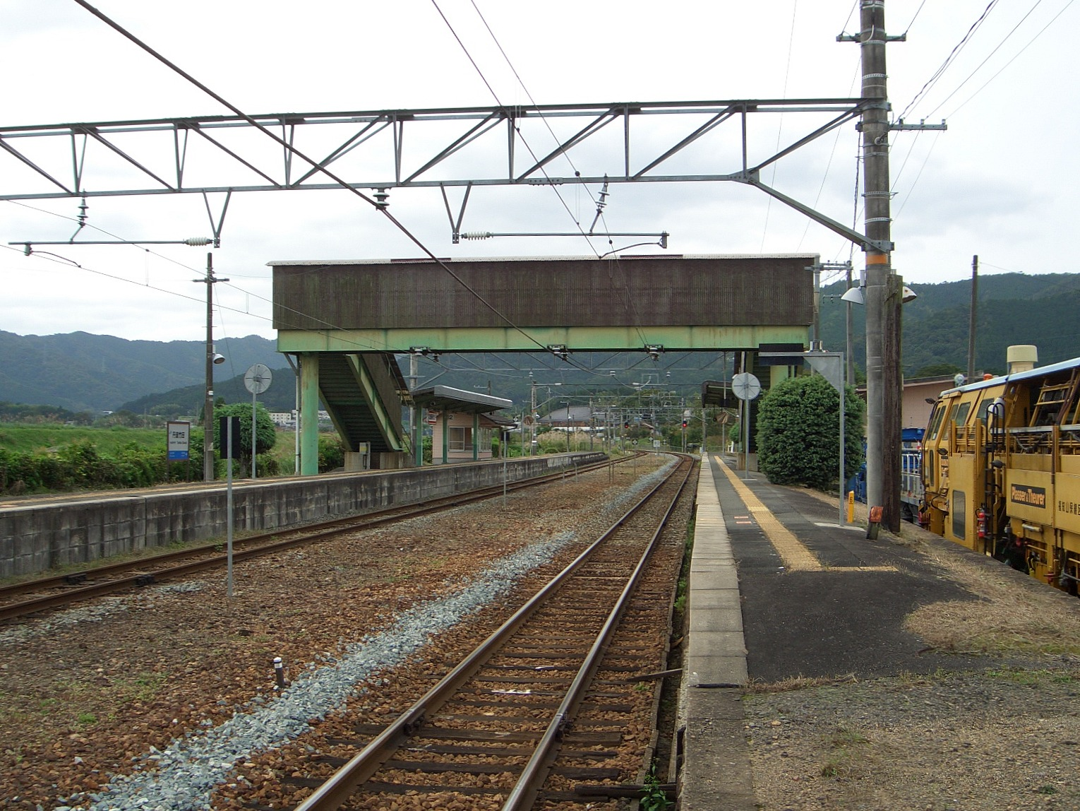 西日本旅客鉄道福知山線丹波竹田駅 構内 1番のりば福知山方より南西を望む